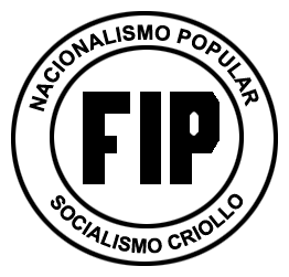 Logo del Frente de Izquierda Popular en las elecciones de 1983